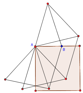 Fichier réalisé avec Geogebra. Construire les deux triangles isocèle de base [AB]. Construire les triangles équilatéraux basés sur les cotés de ces triangles isocèles de façon à ce que deux des triangles ainsi construits aient chacun un côté dont l'intersection est sur la perpendiculaire à (AB) passant par A. On a ainsi deux côtés perpendiculaires du carré, et donc une de ses diagonales. Construire alors le triangle isocèle de base la diagonale du carré.